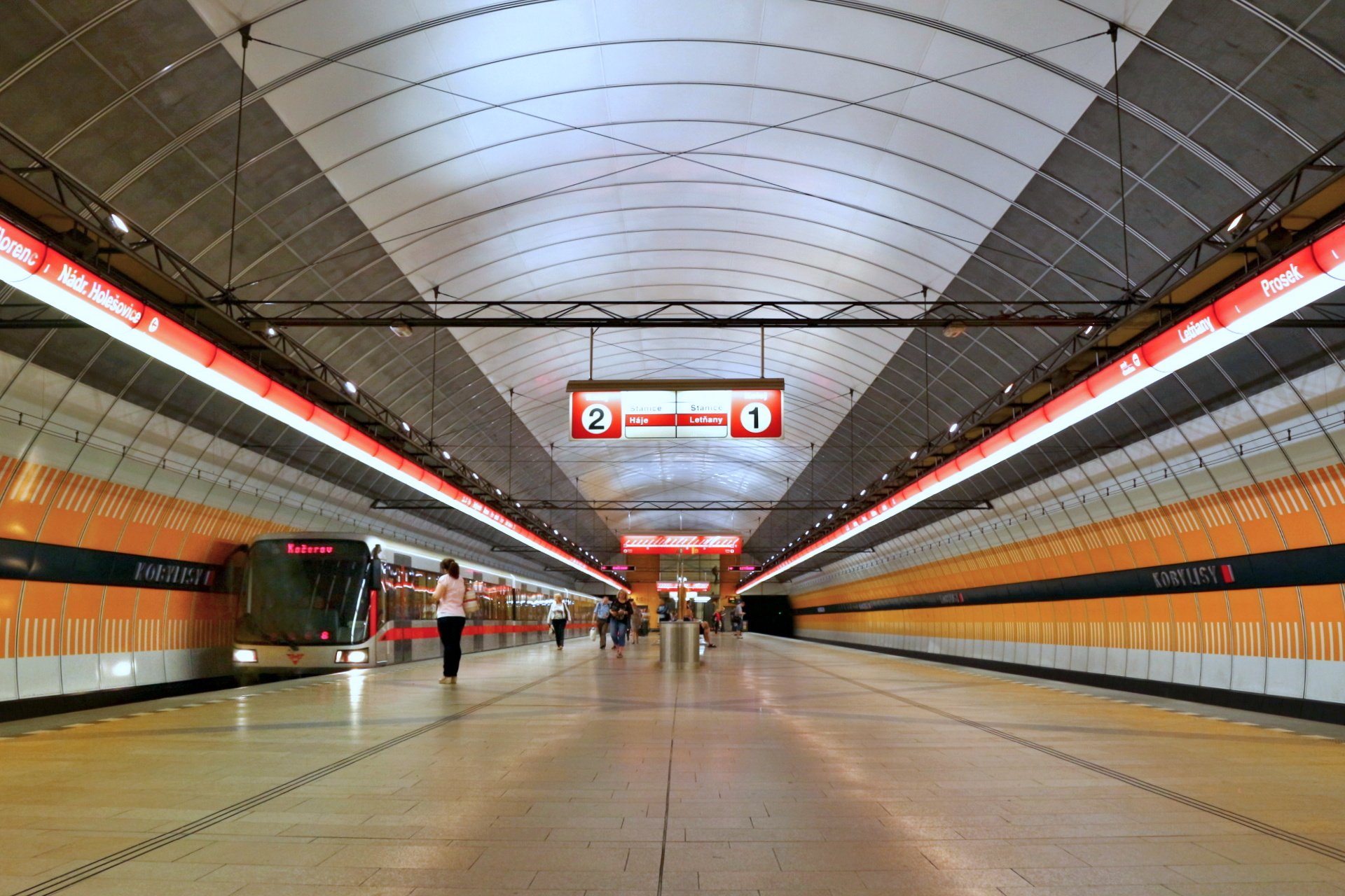 Trasa C - stanice Kobylisy